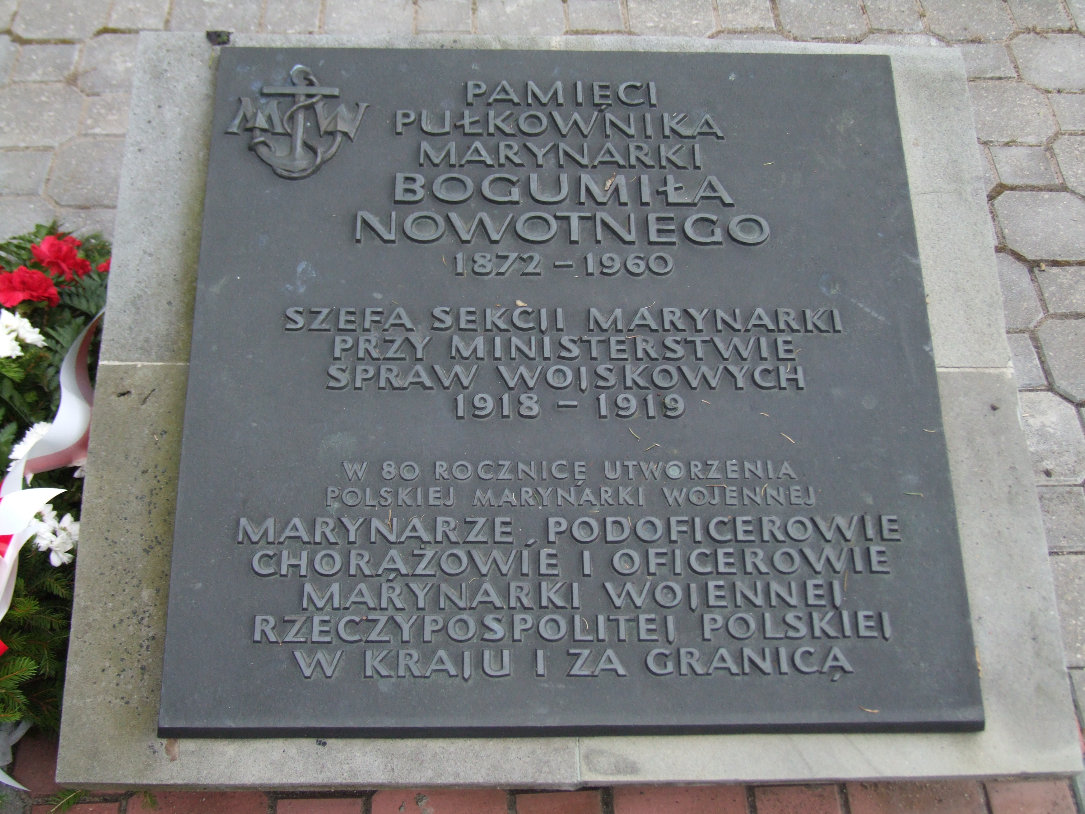 Gdynia-Oksywie Cmentarz Marynarki Wojennej